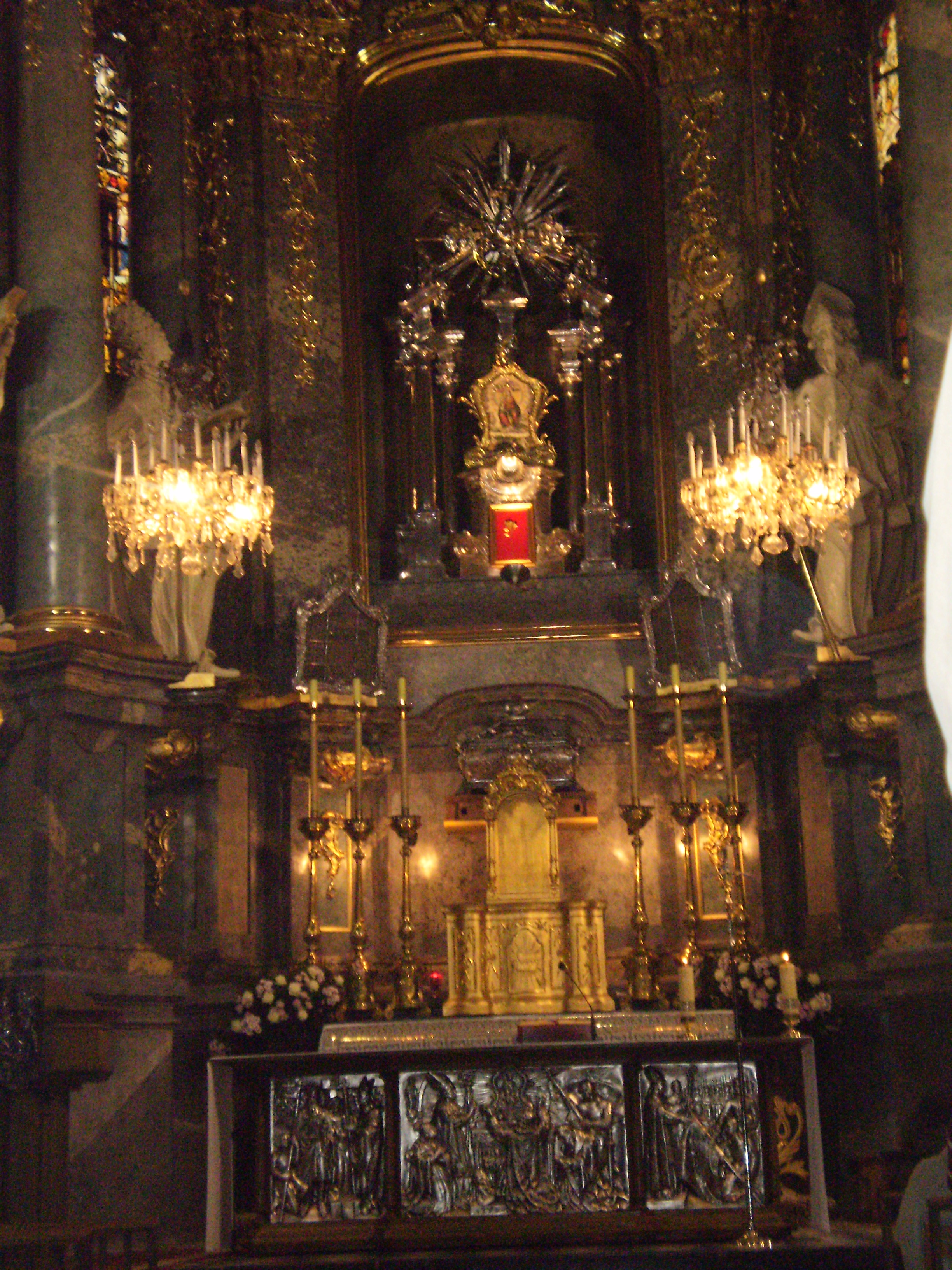 собор Кафедральний, Львів, Катедральна пл., 1